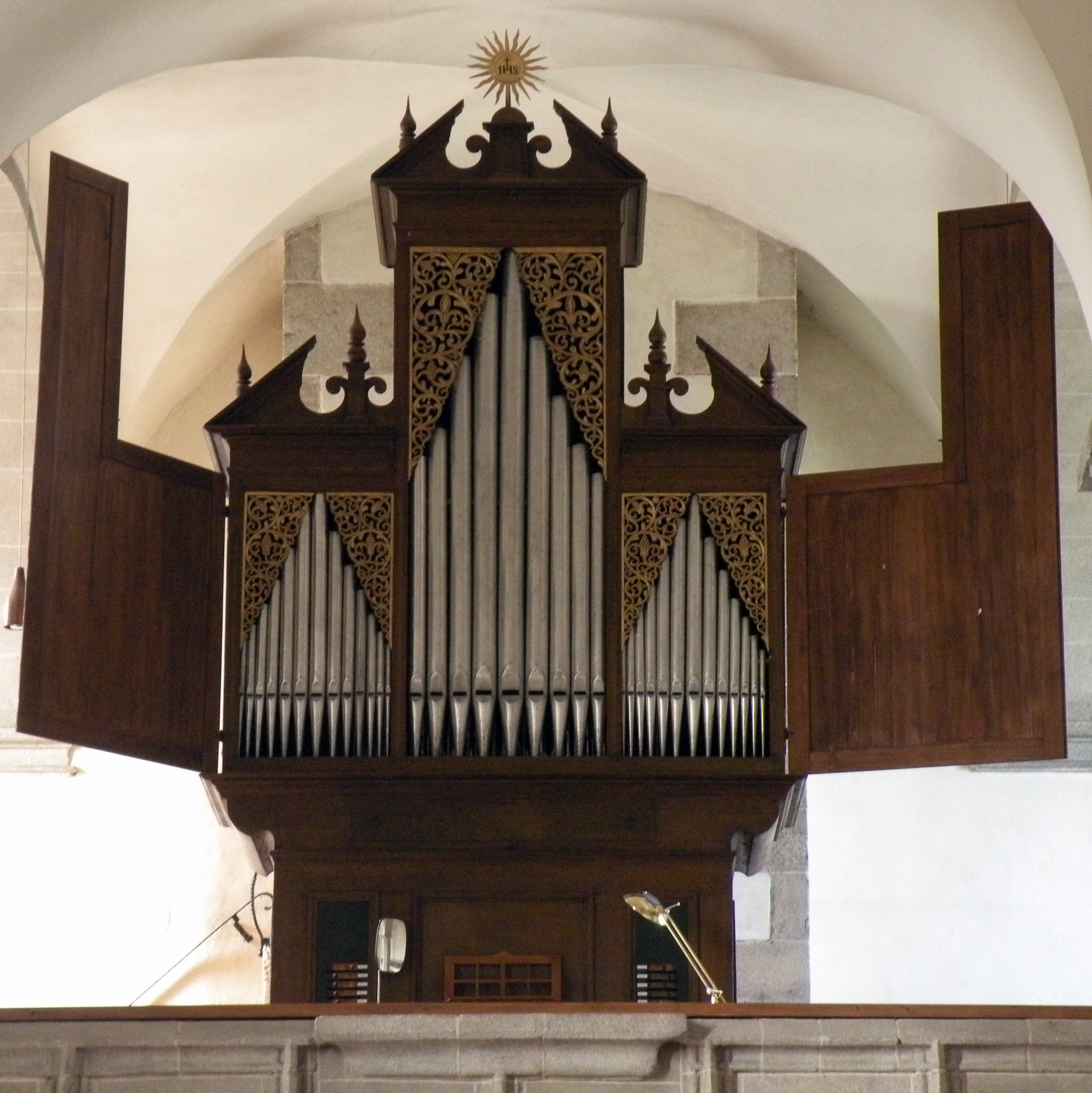 Orgel aus dem 17. Jahrhundert in der Wallfahrtskirche Allerheiligen im Mühlkreis